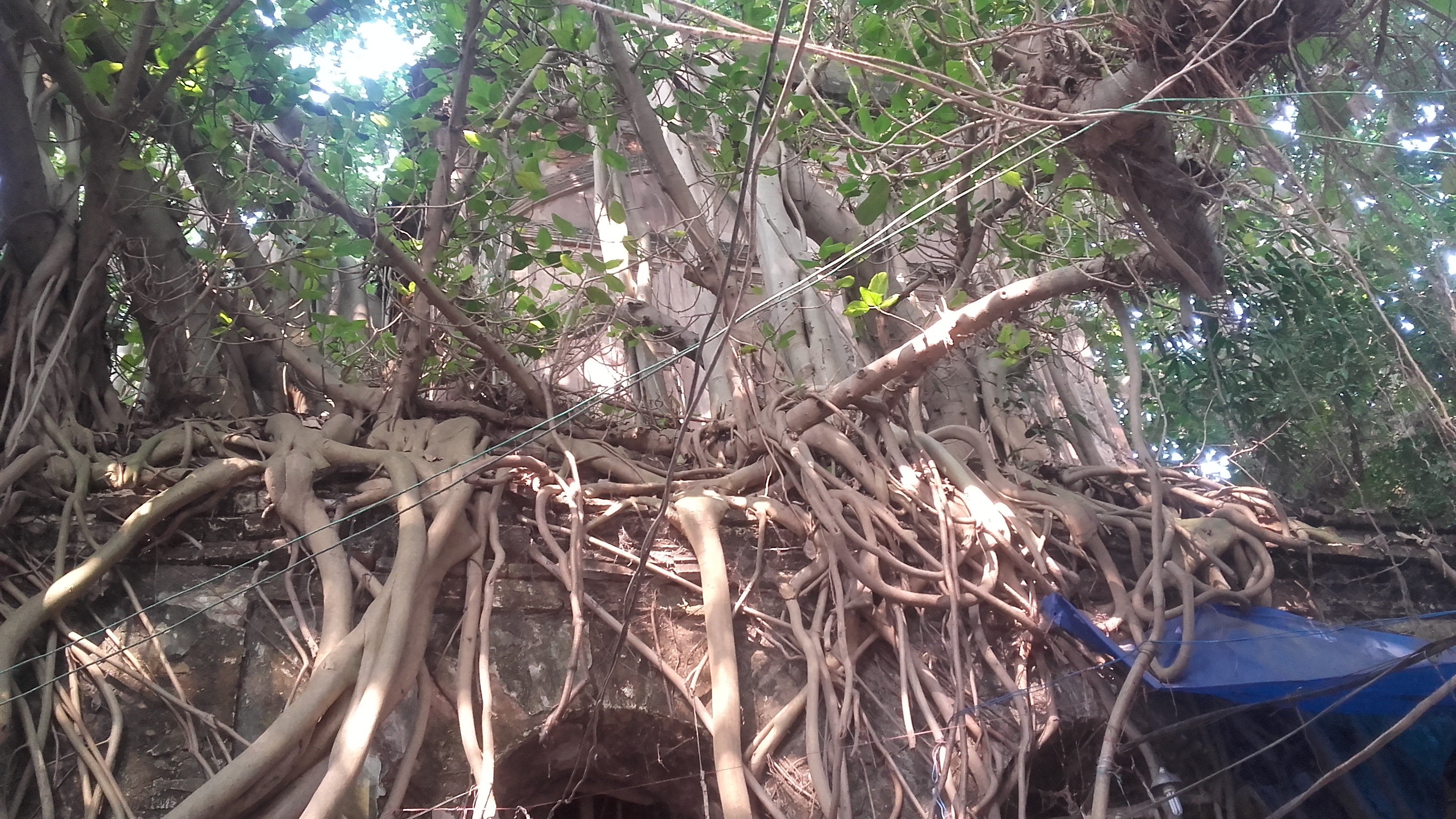 ভবতারিণী মন্দির, নবদ্বীপ; দালানের উপর চারচালা শিল্পরীতির একটি নিদর্শন, বর্তমানে বট গাছের শেকড়ে আচ্ছাদিত